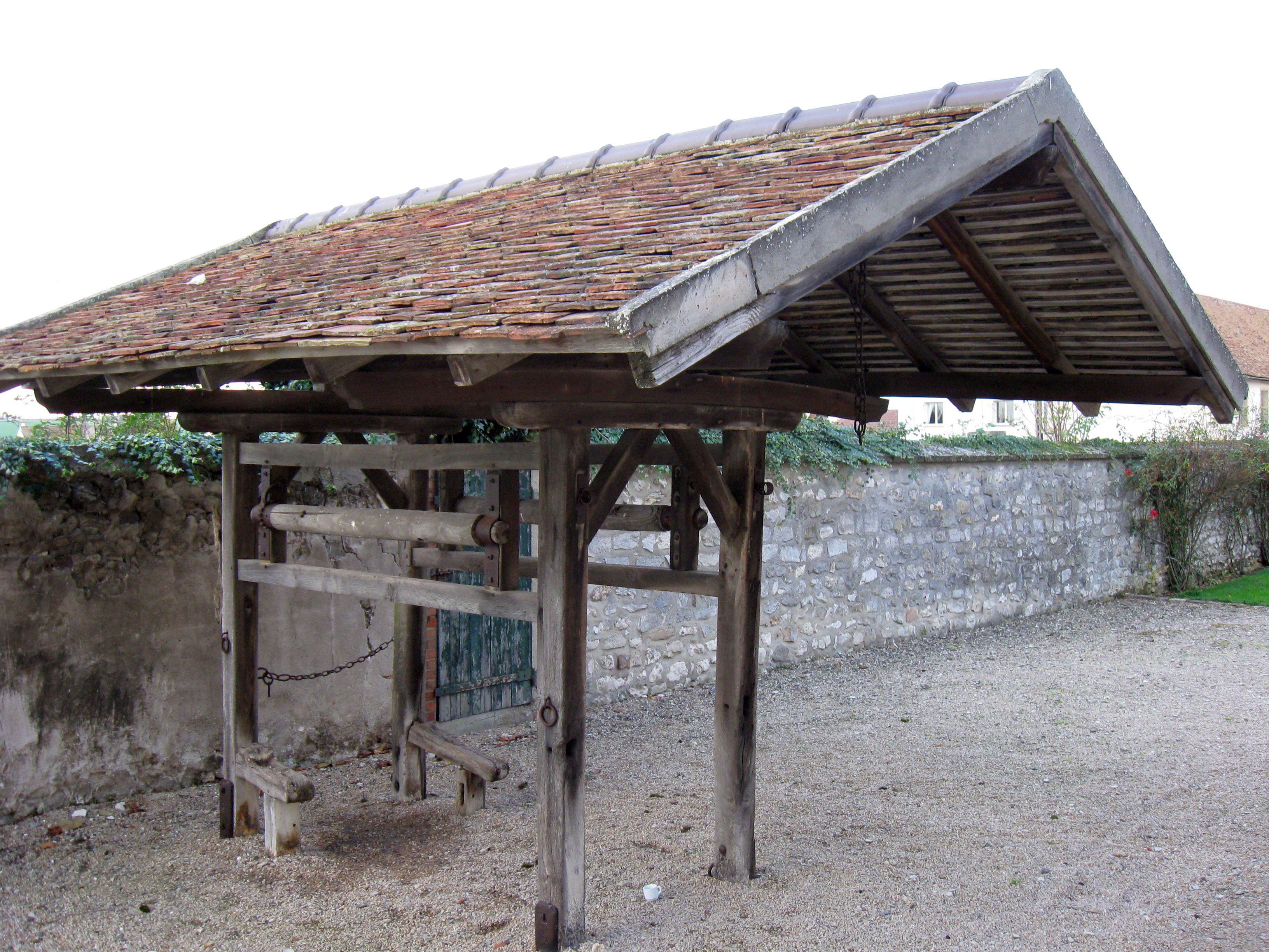 Travail servant au ferrage des grands animaux. (Saint-Mesmes, département de la Seine-et-Marne, région Île-de-France).